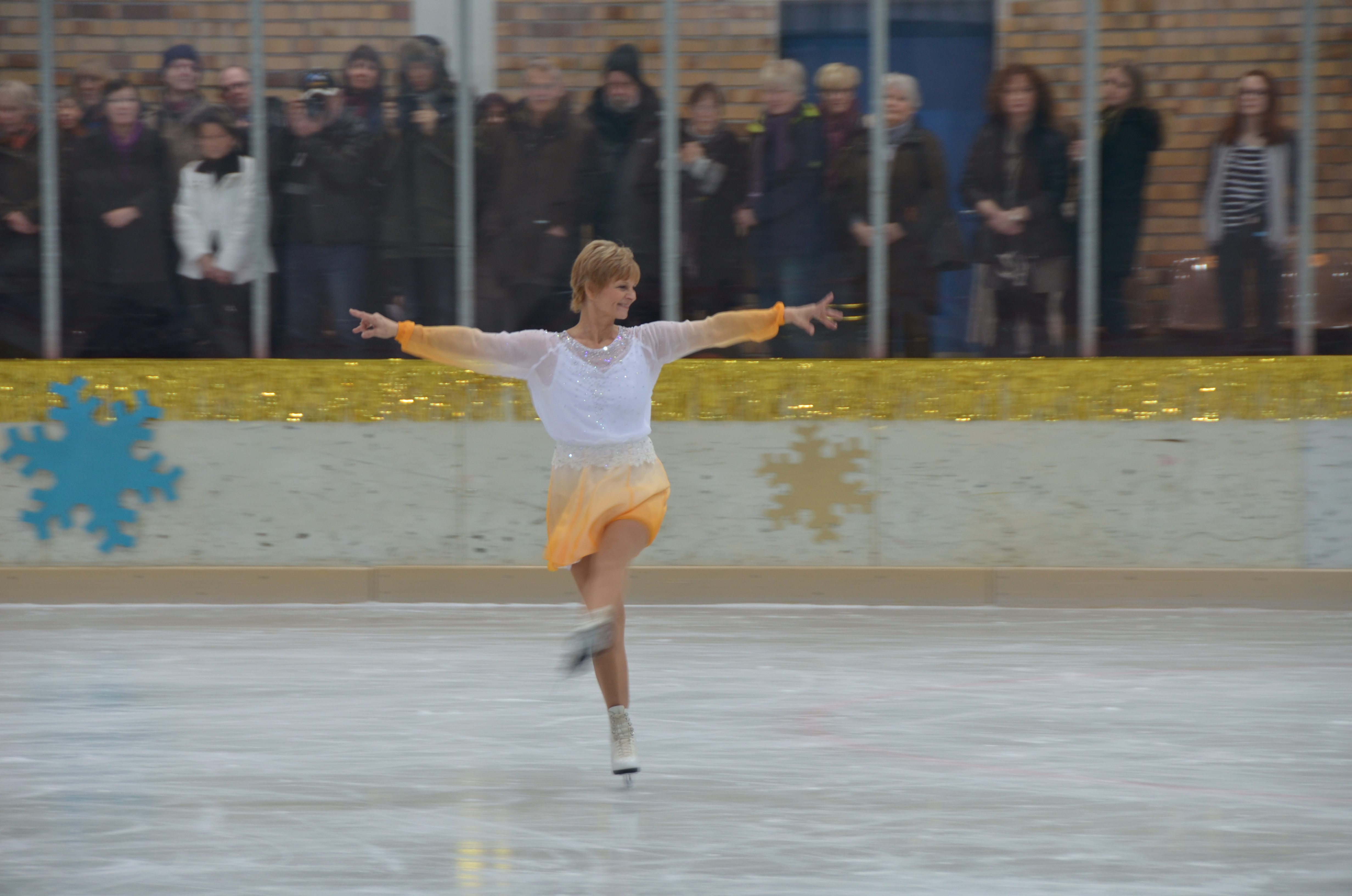 Berlin Sportforum Hohenschönhausen